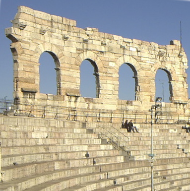 "Flügel" der Arena, Verona